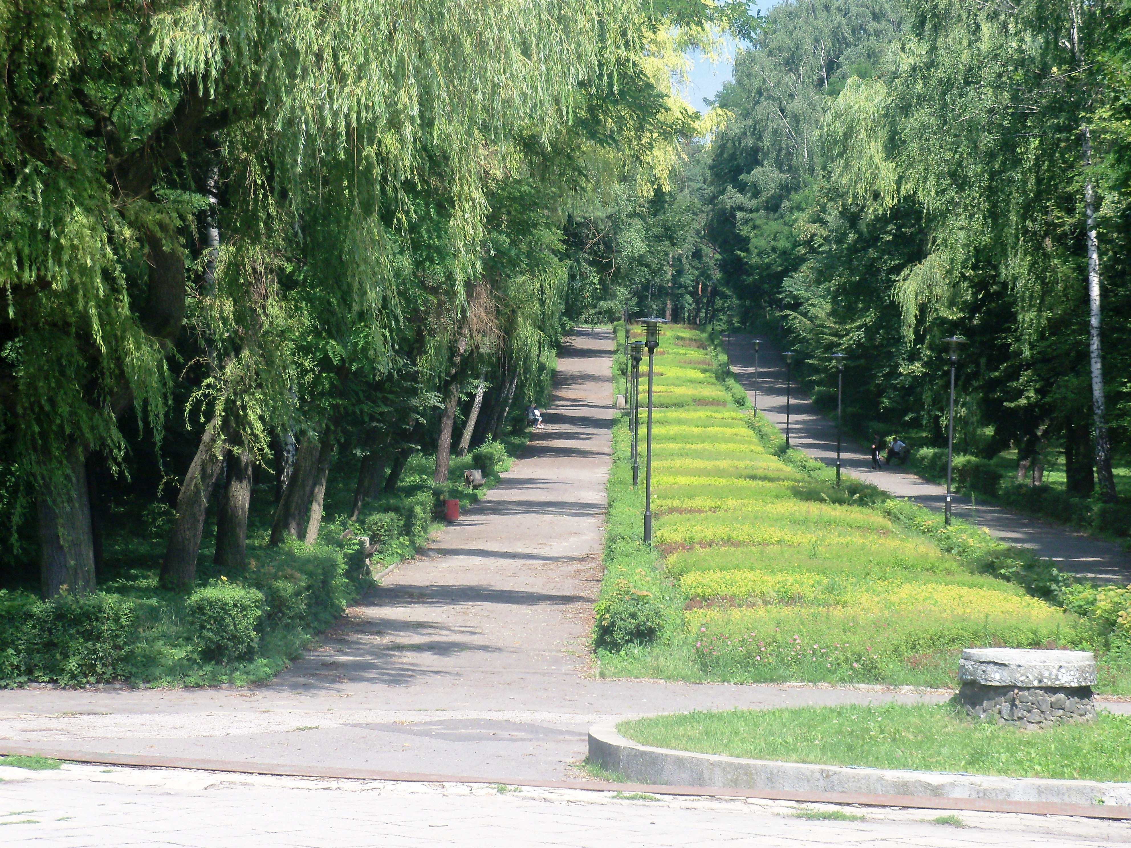 Park w Wojkowicach - przy skrzyżowaniu ul. Sobieskiego i ul. Plaka